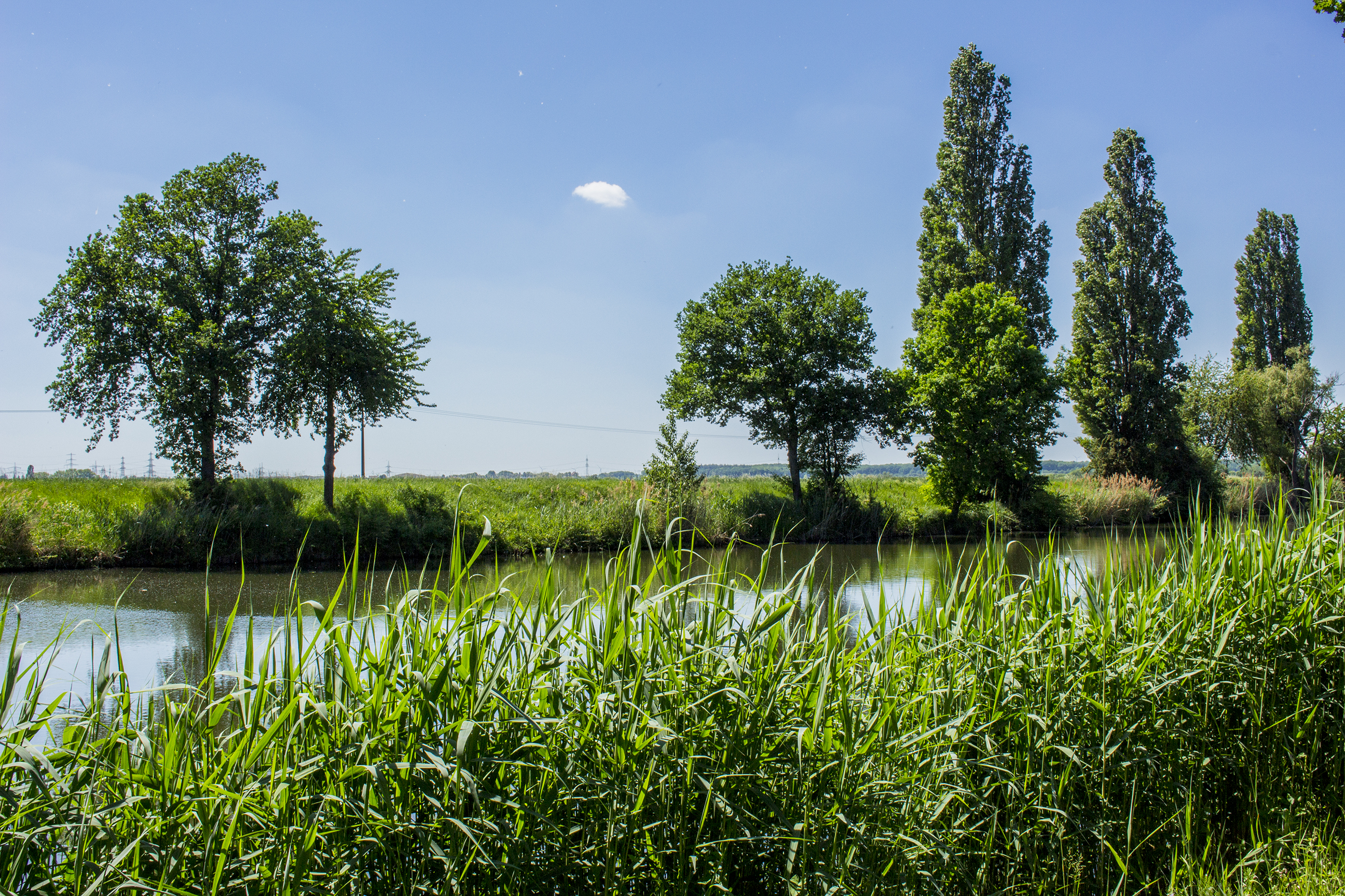 Naturschutzgebiet Grafenrheinfeld - Blick auf den Alten Main, Blickrichtung Kernkraftwerk Grafenrheinfeld.